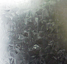 亜鉛めっき鉄板表面